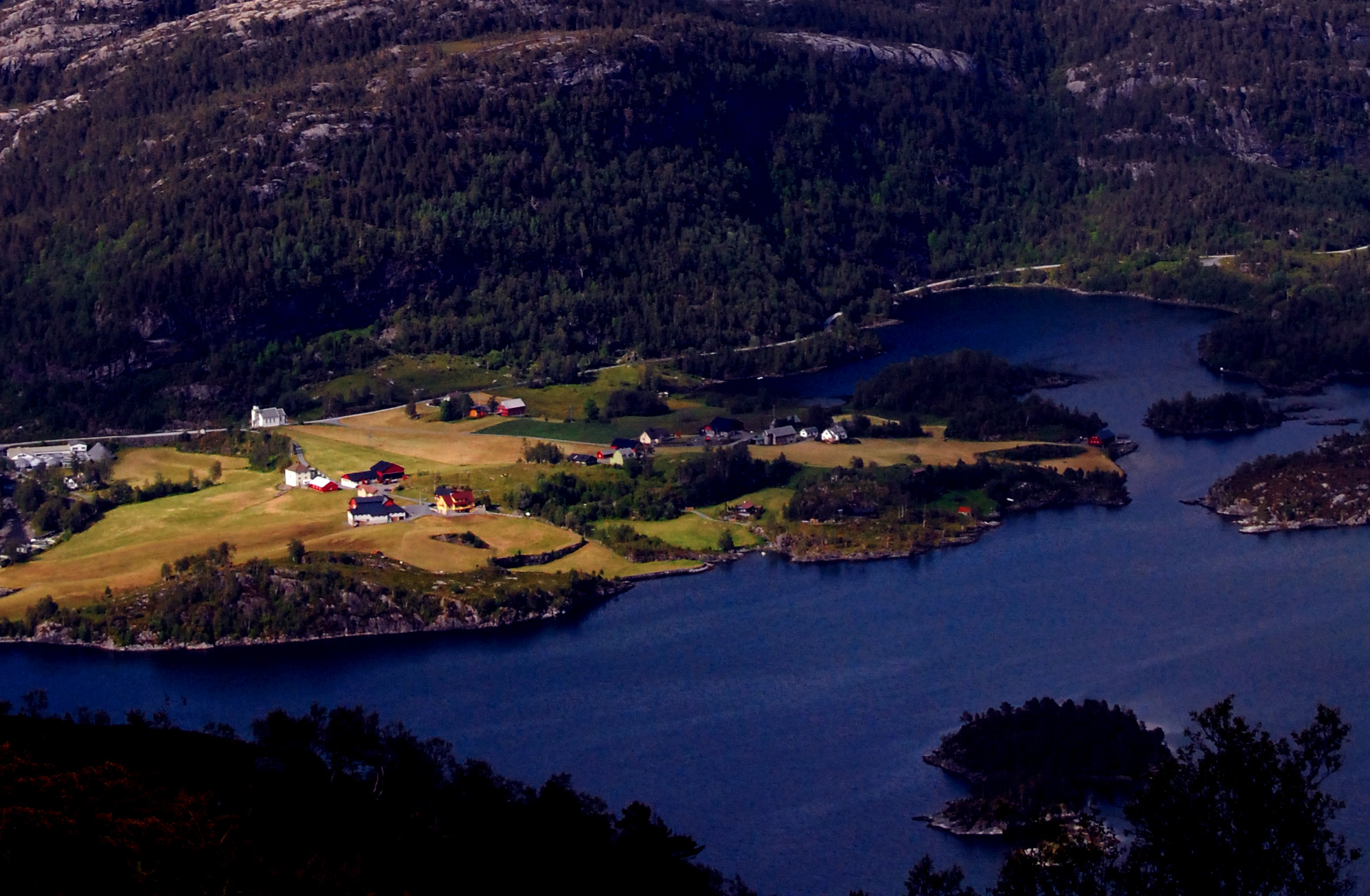 Norddalsfjorden